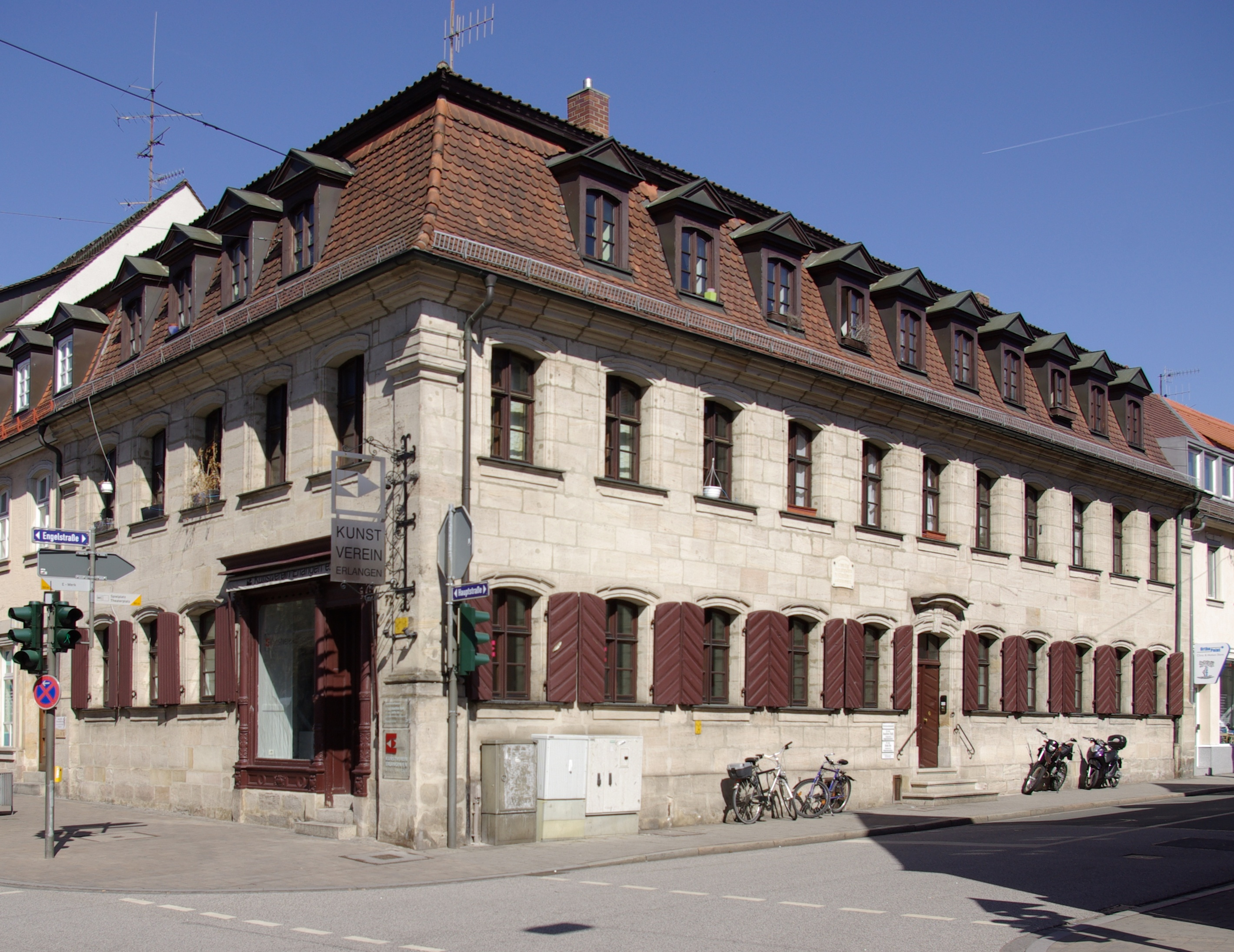 Hauptstraße 72 in Erlangen, Geburtshaus von Wilhelm Fleischmann.